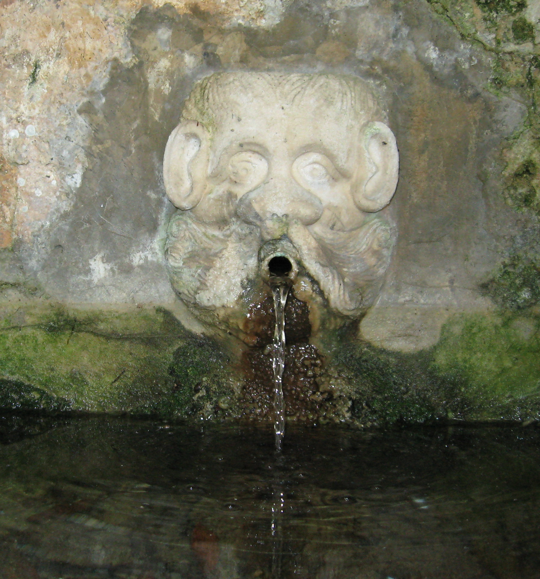 Mosteiro de Alcobaça, water-conduit, fountain Quintal de Noviços, gargoyle, 16th.century